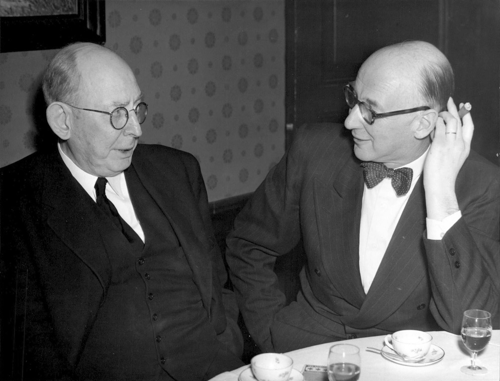 Förre TT-chefen Gustaf Reuterswärd och nuvarande verkställande direktören överste Olov Sundellvid jubileumsfesten på Metropol.Tidningarnas Telegrambyrå högtidlighöll på lördagen sin 30-åriga tillvaro. TT:s styrelse hade på kvällen inbjudit ett 80-tal av personalen vid stockholmskontoret till middag på restaurang Metropol. Styrelsens ordförande, fil.dr. Ivar Anderson, erinrade i ett anförande om TT:s tillkomst under brydsamma förhållanden och ...